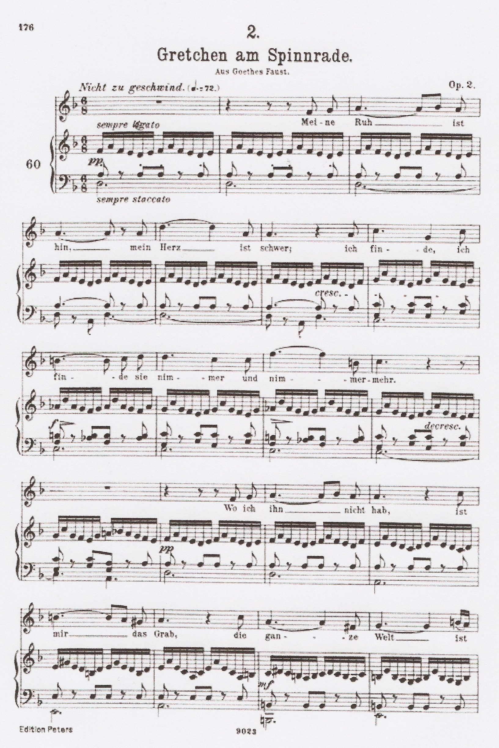 Margarita en la rueca de Schubert